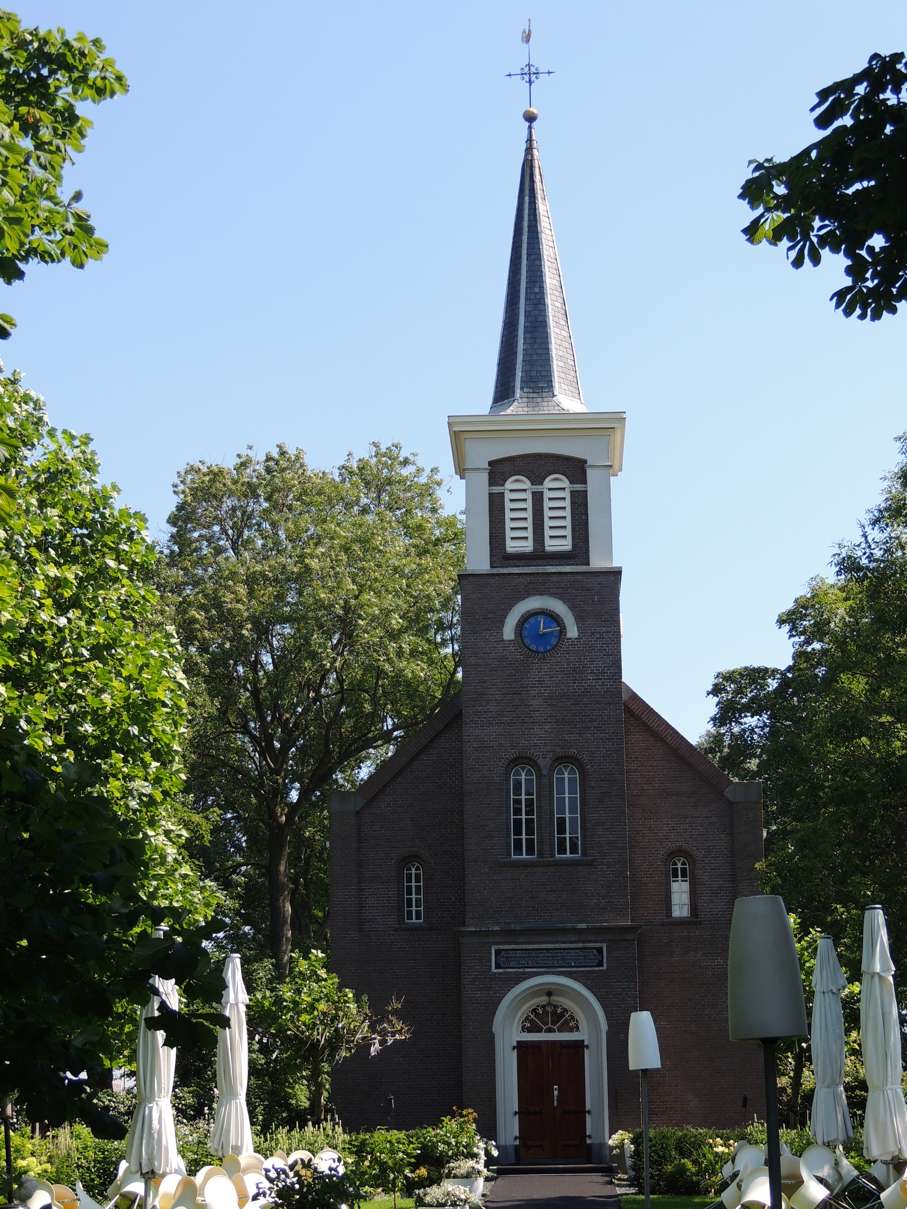 Hervormde kerk van Terherne